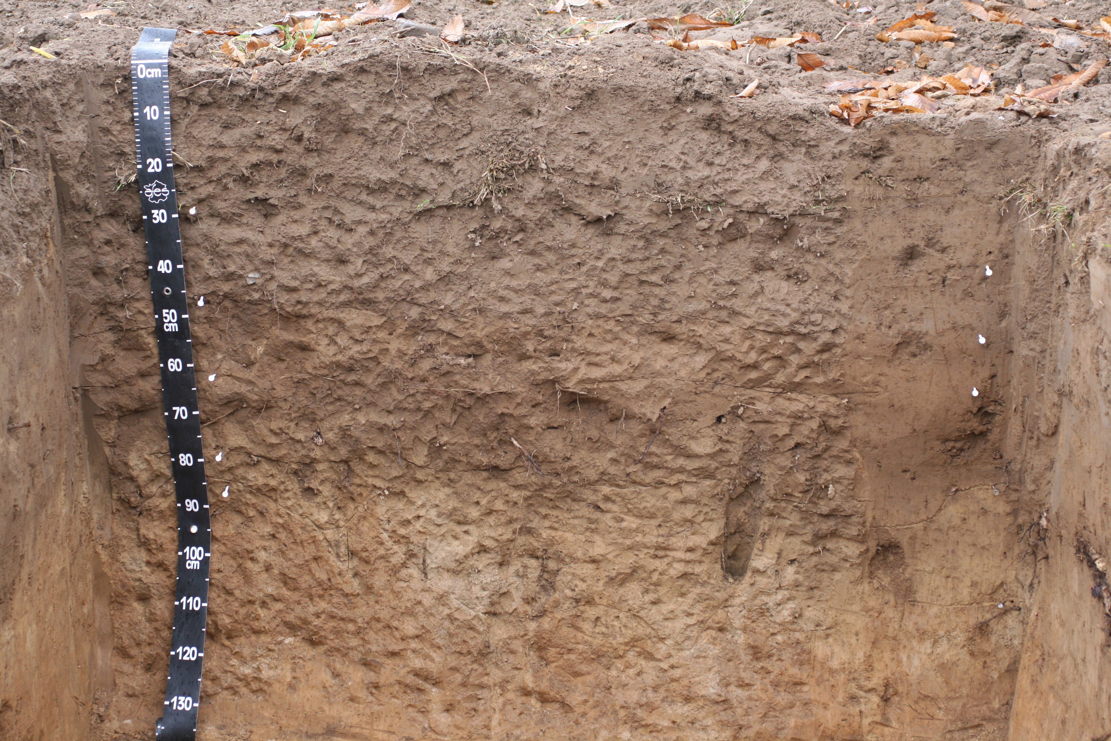 Colliviosol sur lumon (Vieux-Viel, 35)